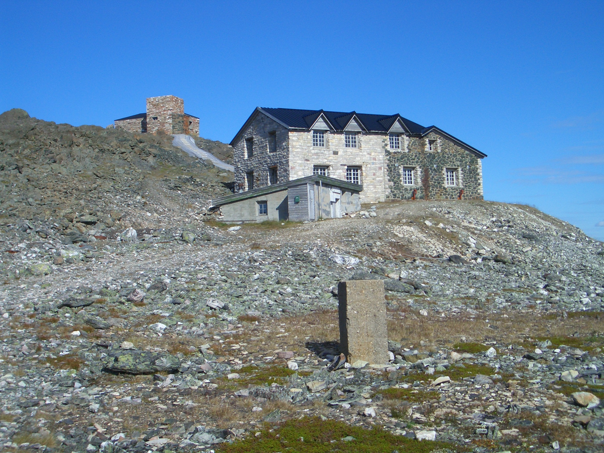 Haldde